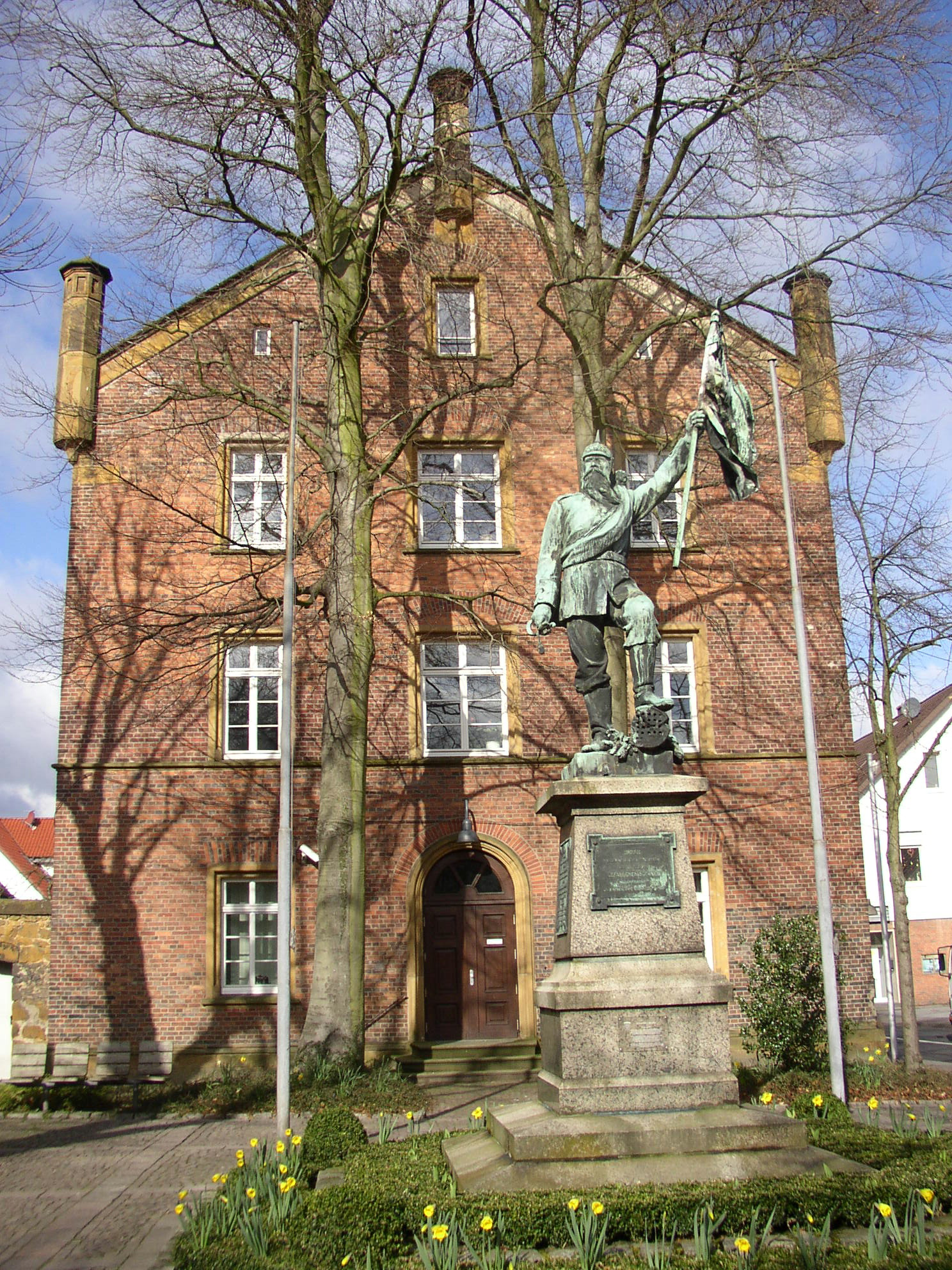 Amtsgericht, Halle (Westfalen) This is a photograph of an architectural monument. It is on the list of cultural monuments of Halle (Westf.), no. 1